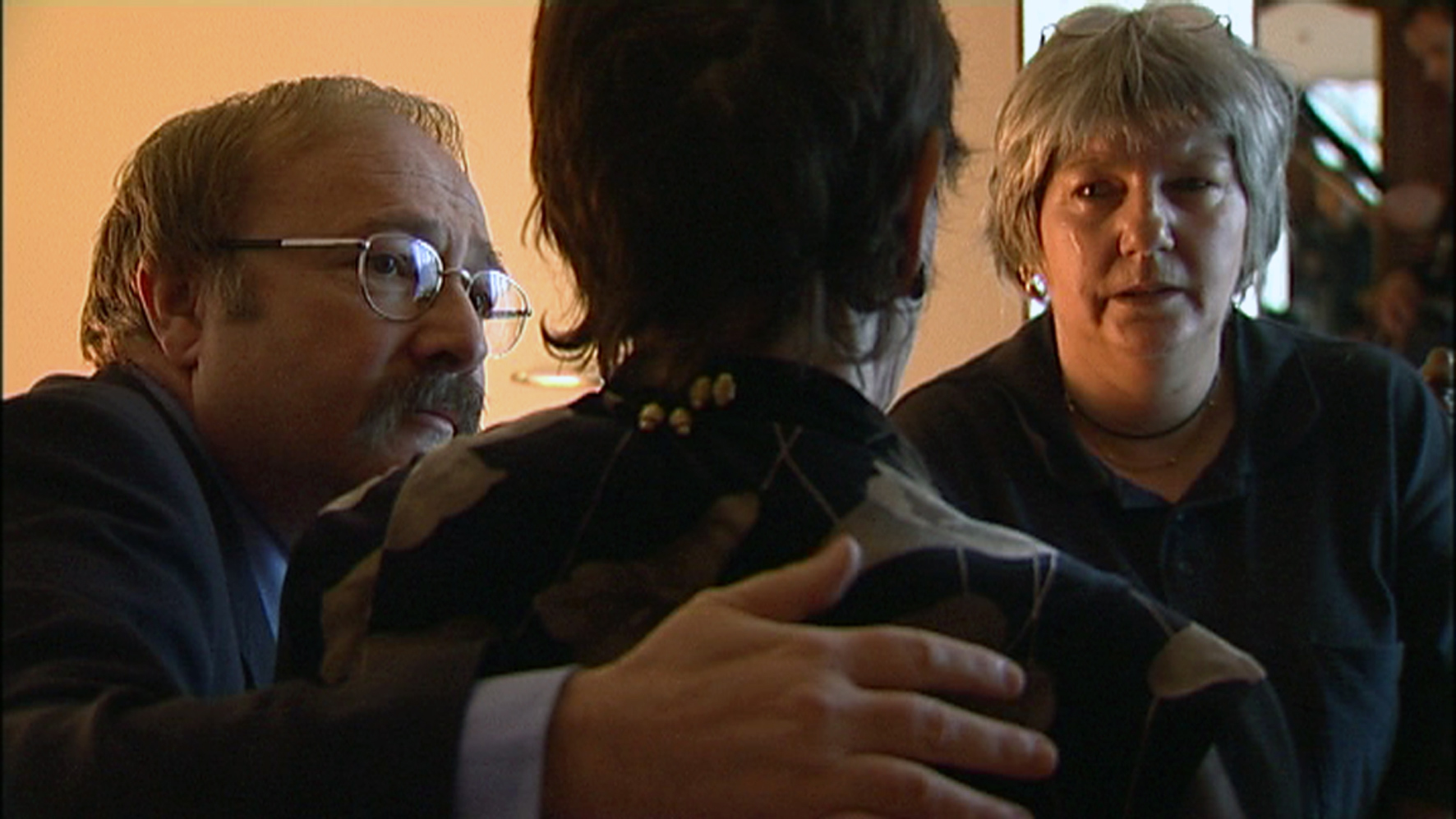 Dr Sobel et Magali disent au revoir à Micheline. Image tirée du film « EXIT, le droit de mourir » de Fernand Melgar.